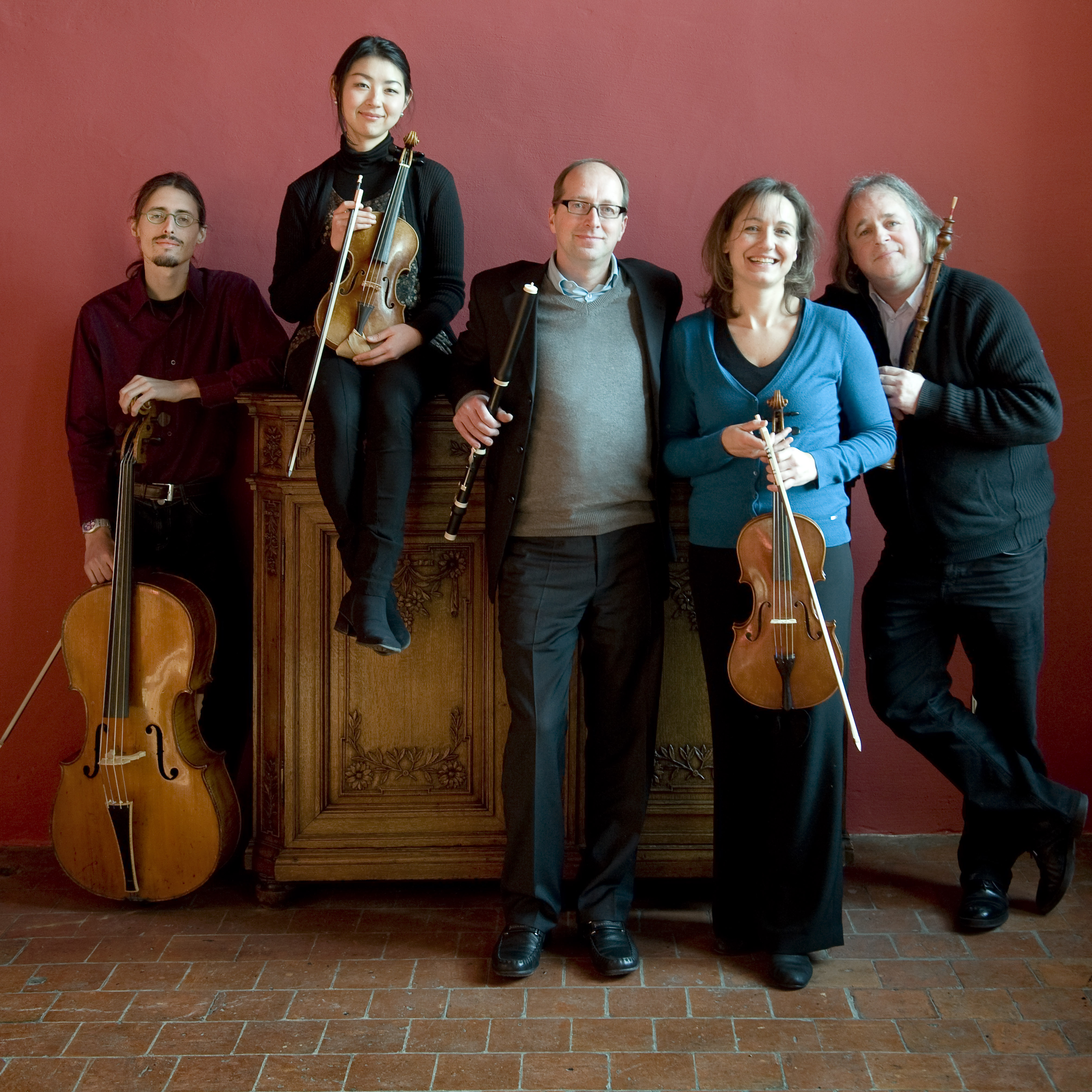 Il Gardellino, oude muziek ensemble met Ira Giwoi, cello; Mayumi Hirasaki, viool; Jan De Winne fluit, Kaat Decock, altviool; Marcel Ponseele, hobo